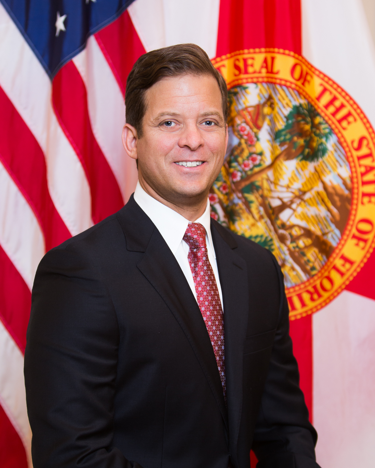 Florida lieutenant governor Carlos López-Cantera